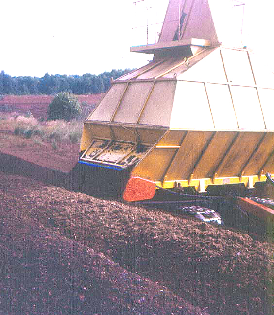 Torfgewinnung in West-Mecklenburg, sowjetischer Weißtorf-Sammler